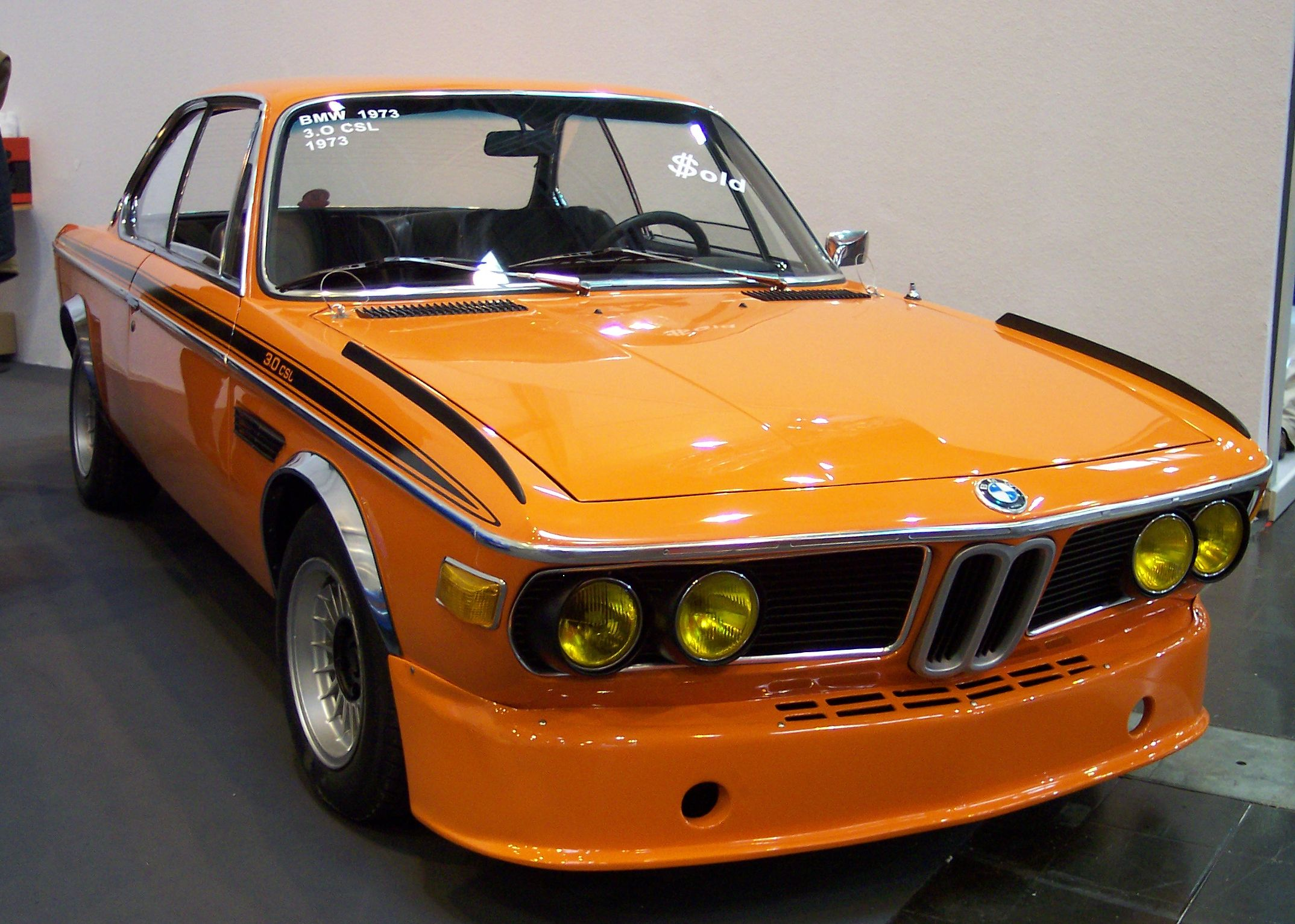 BMW 30 CSL